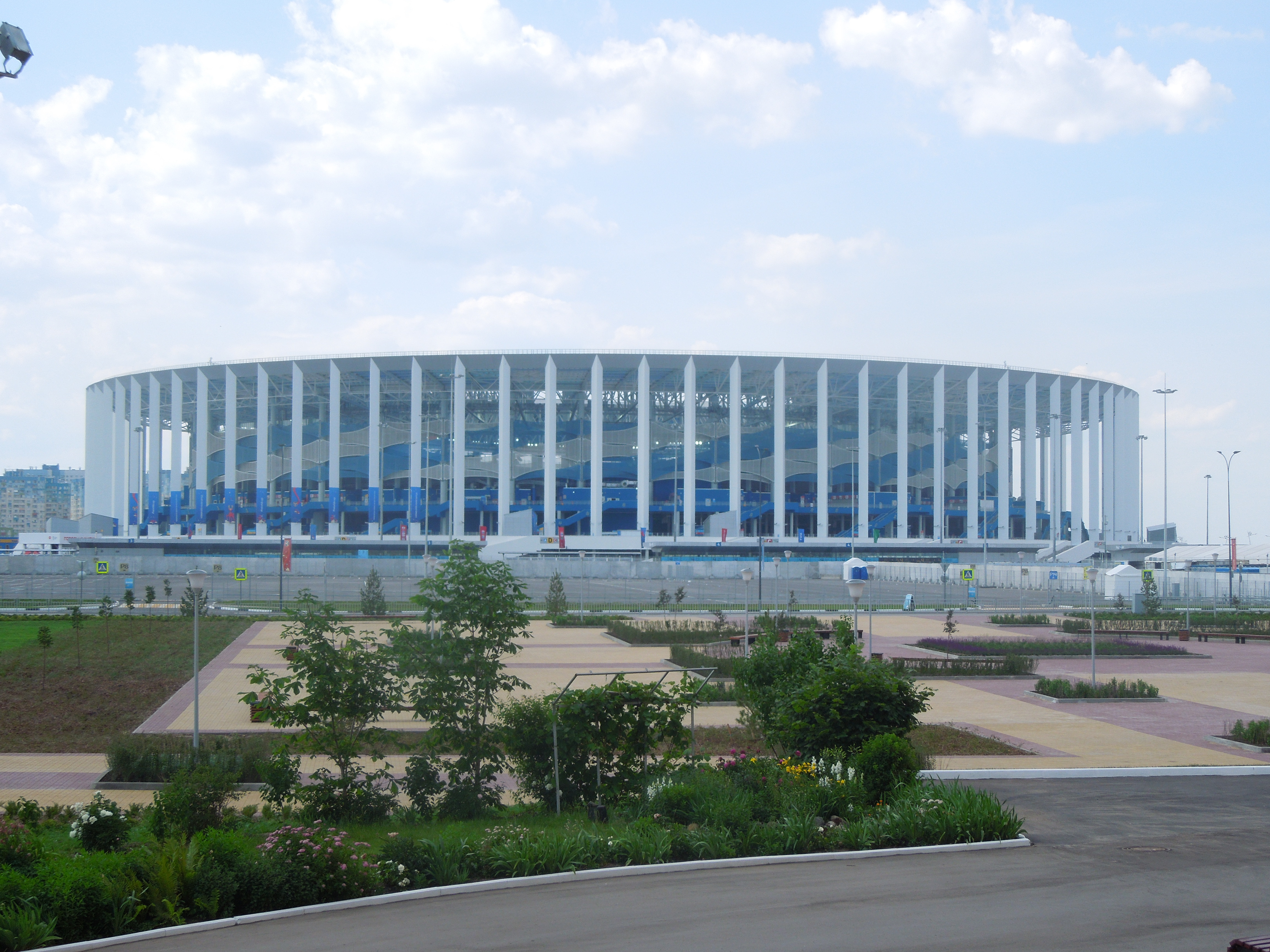 стадион